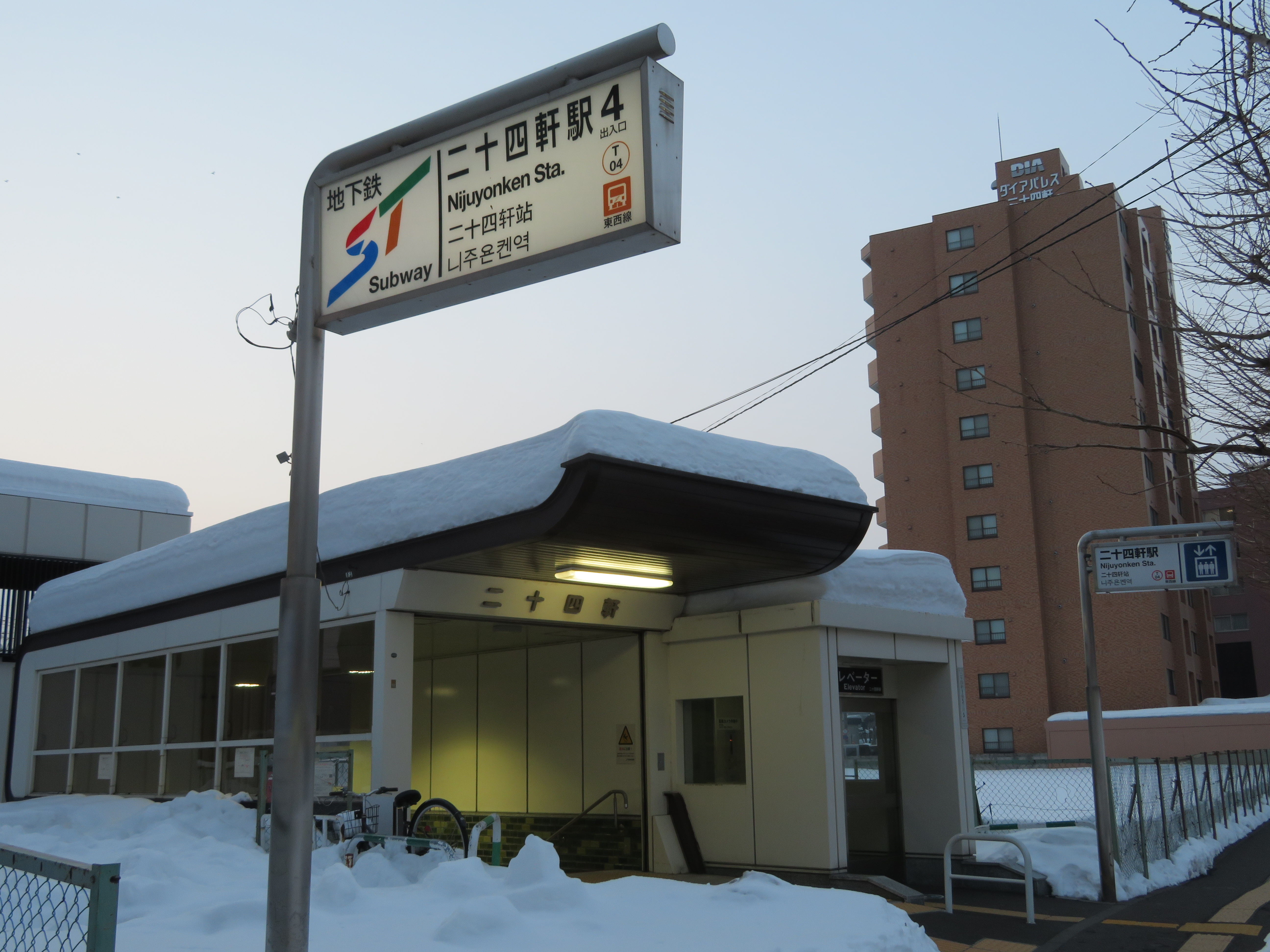 二十四軒駅4番出入口 Canon PowerShot SX720 HS